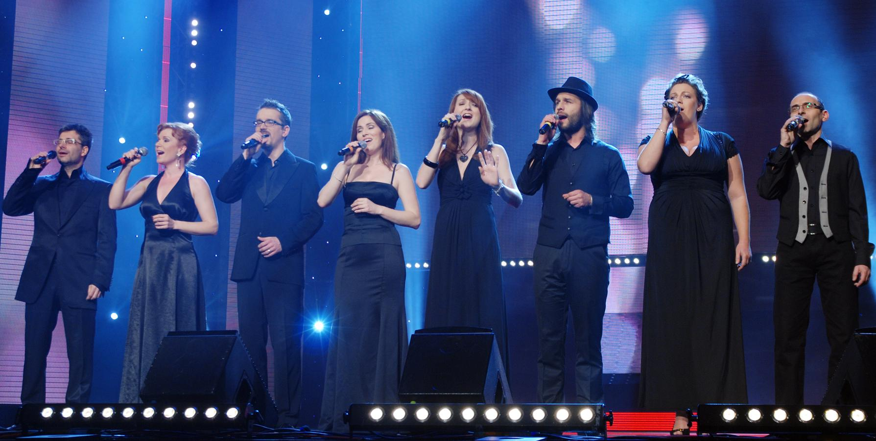 Fragile - Odovzdávanie cien Krištáľové krídlo 2010